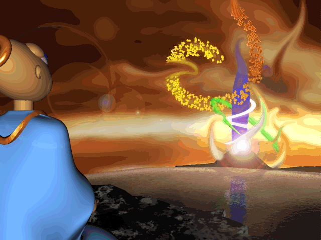 Capture d'écran du jeu vidéo Little Big Adventure (1994), développé par Adeline Software International.